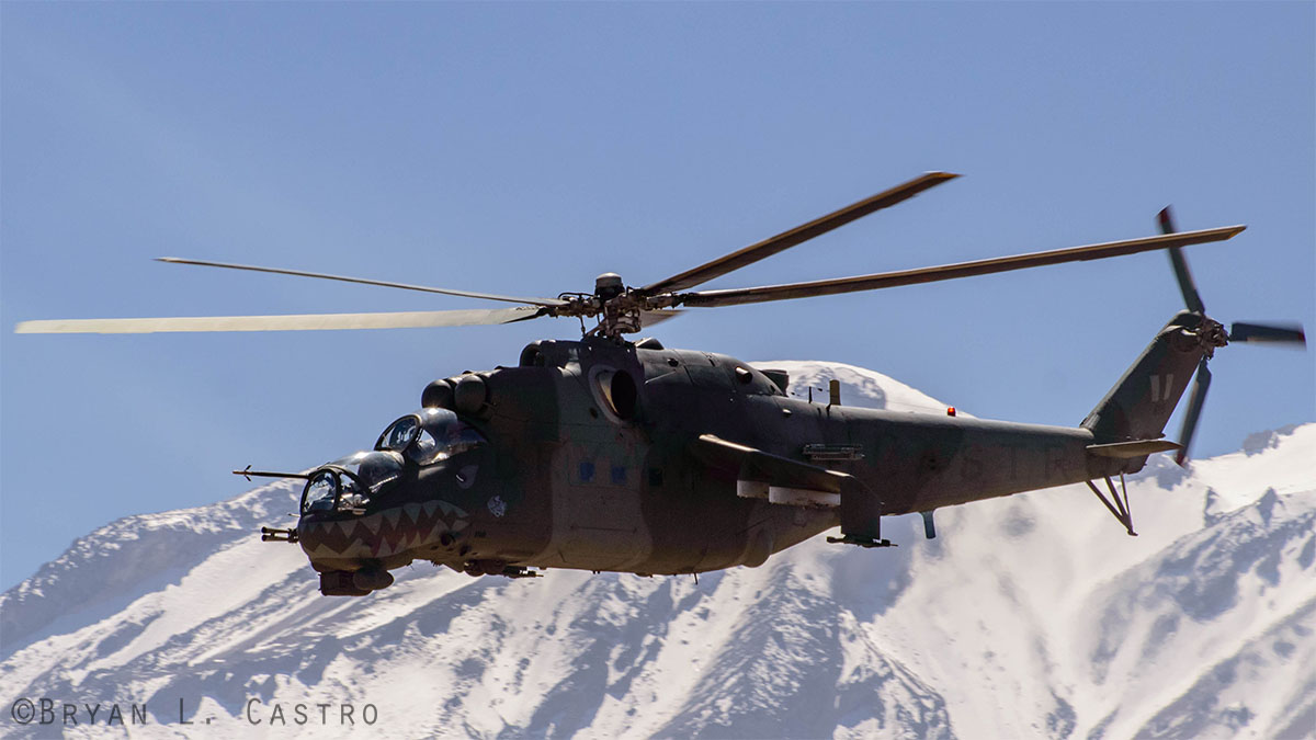 Mil MI-35P sobrevolando la Ciudad de Arequipa. Fuerza Aérea del Perú.